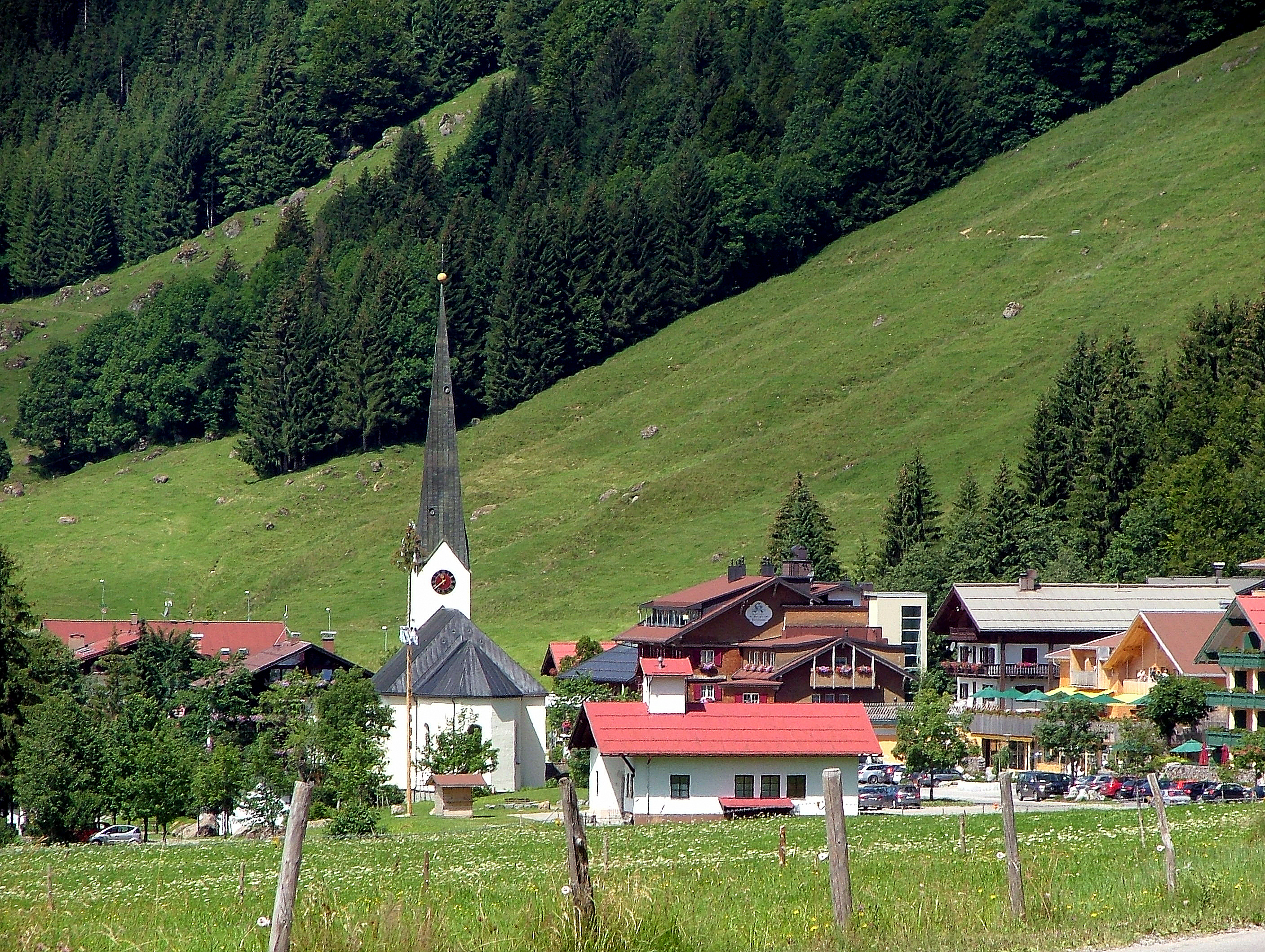 Bregenzer Wald